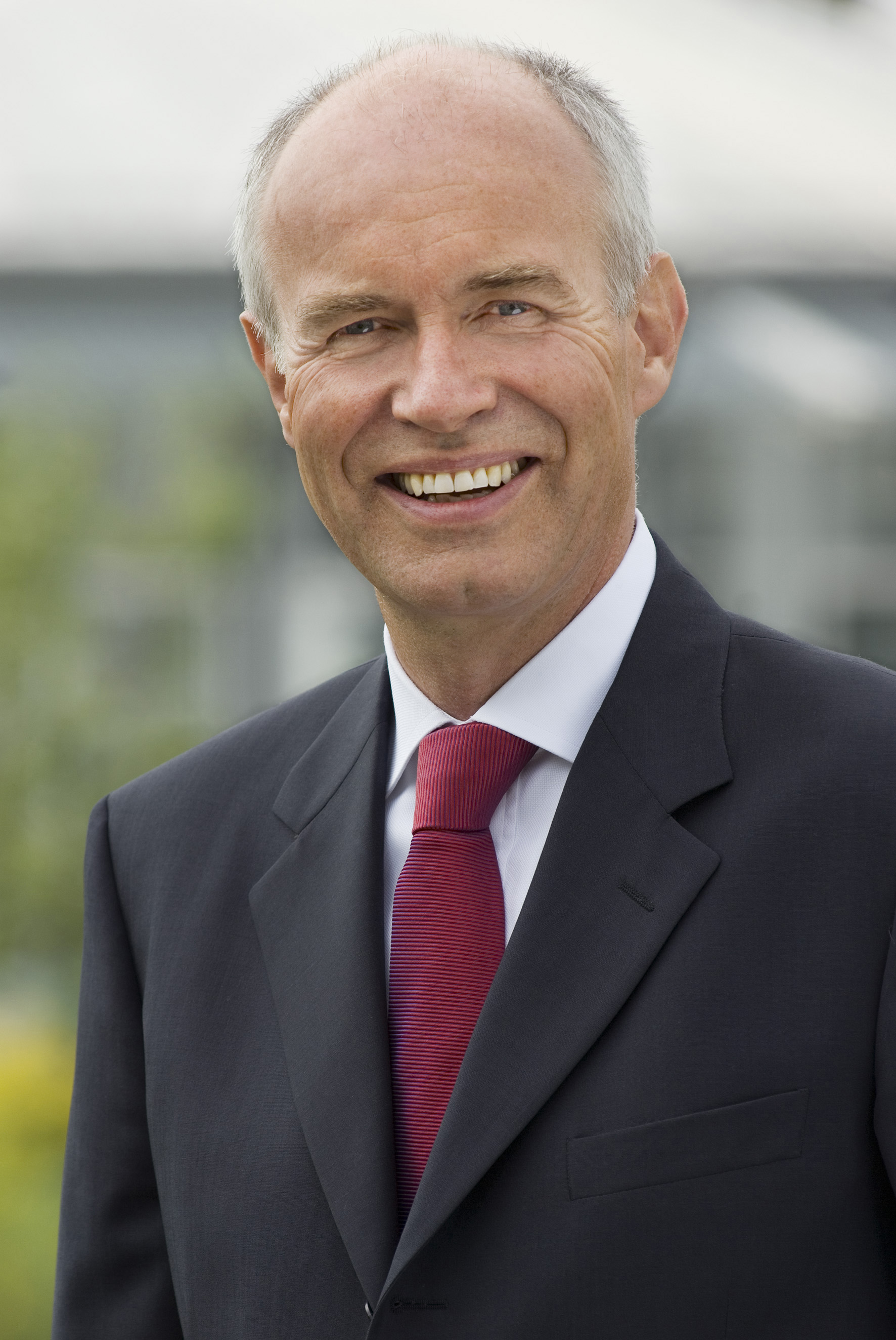 Götz Rehn